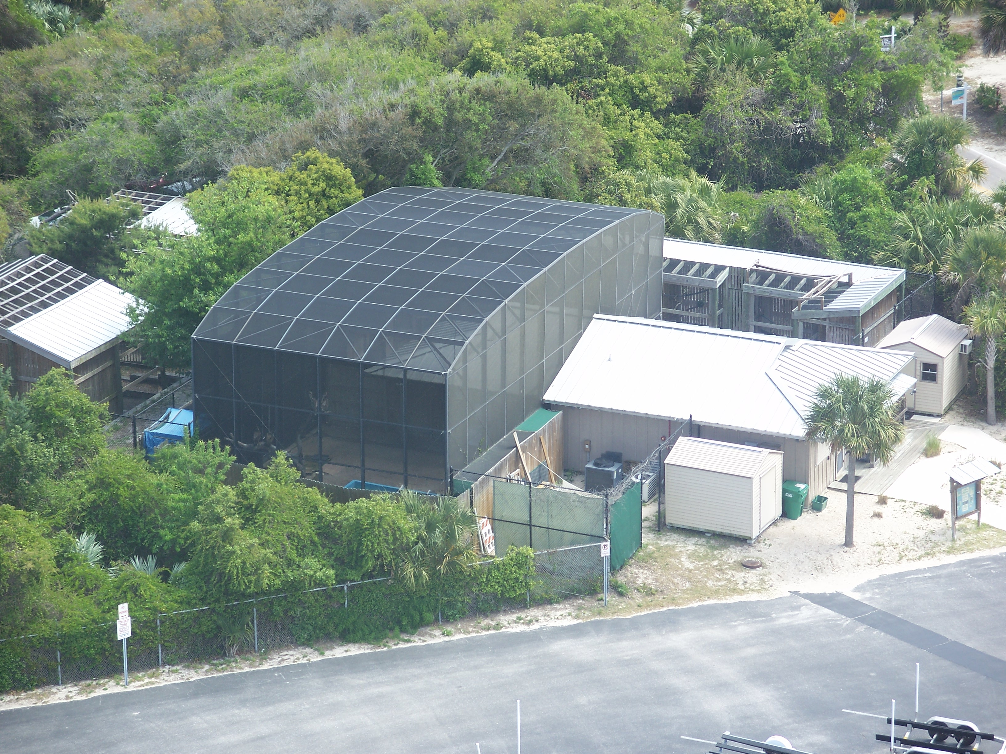 Ponce Inlet, Florida: Marine Science Center